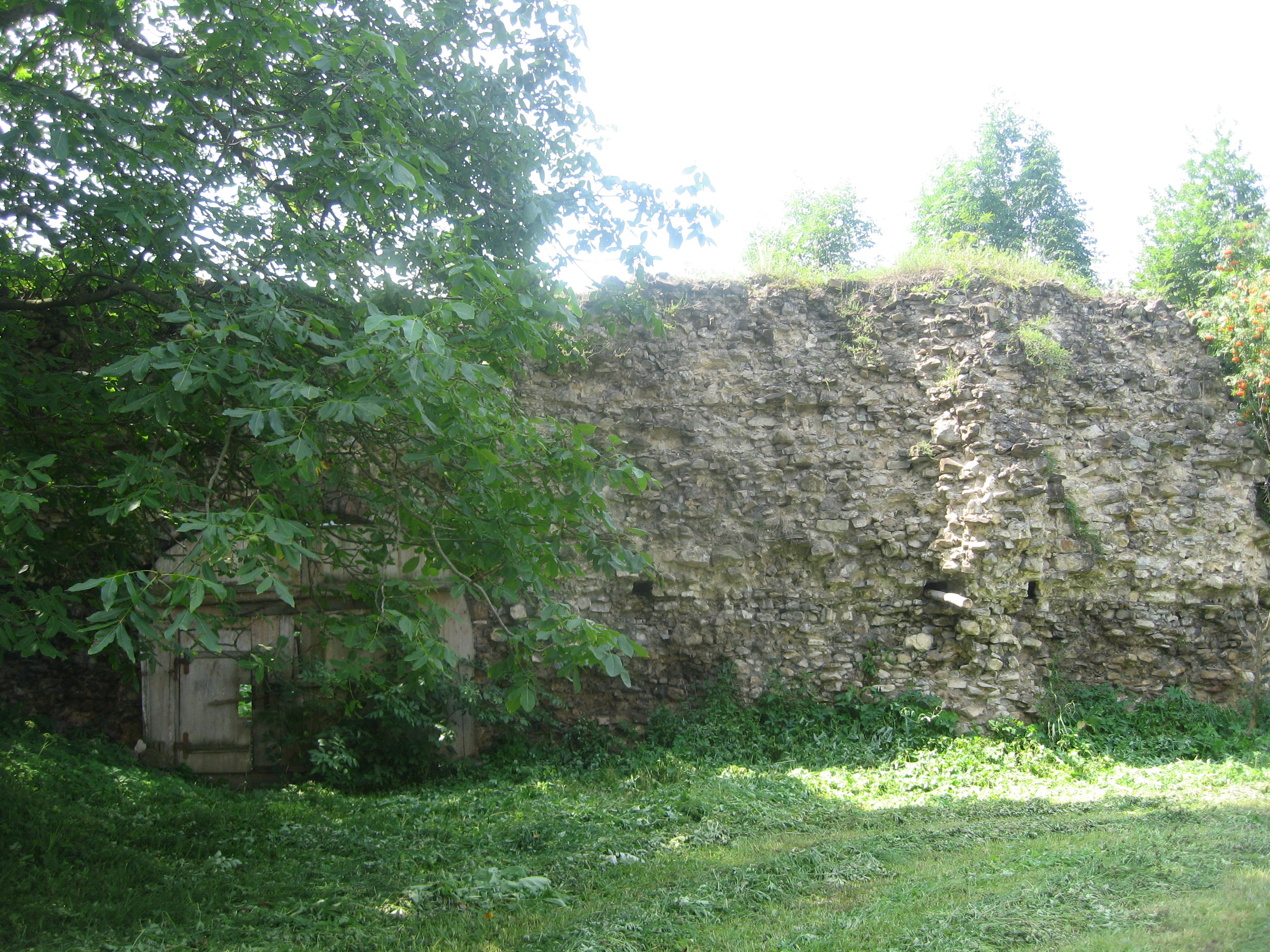 Biserica "Sf. Apostoli Petru și Pavel" din Solca 02